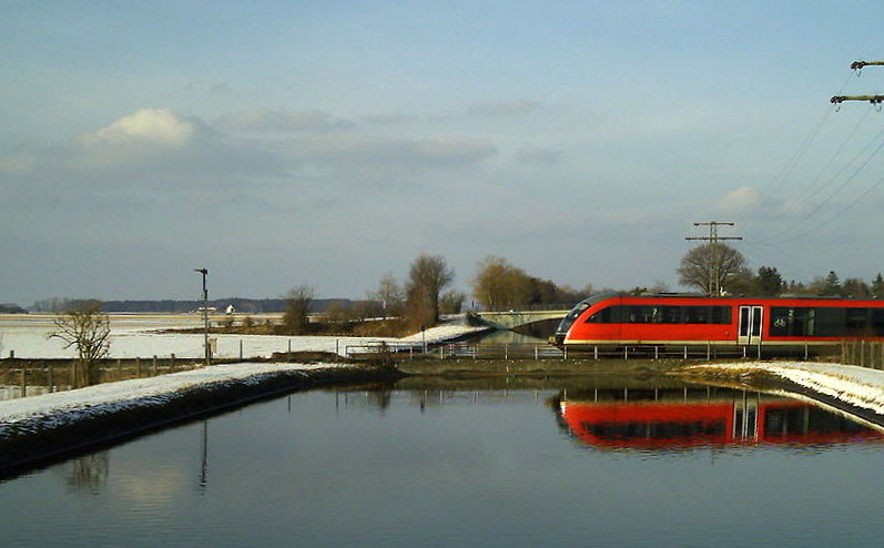 Illerkanal beim Illerkraftwerk II.